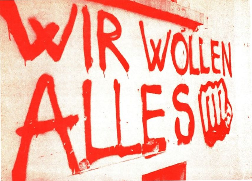 Manchette du premier numéro du journal "Wir wollen alles" (1973-1975).